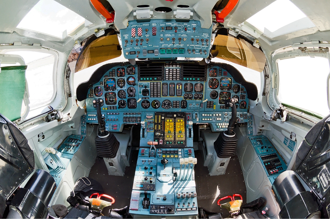 Tupolev Tu-160 cockpit